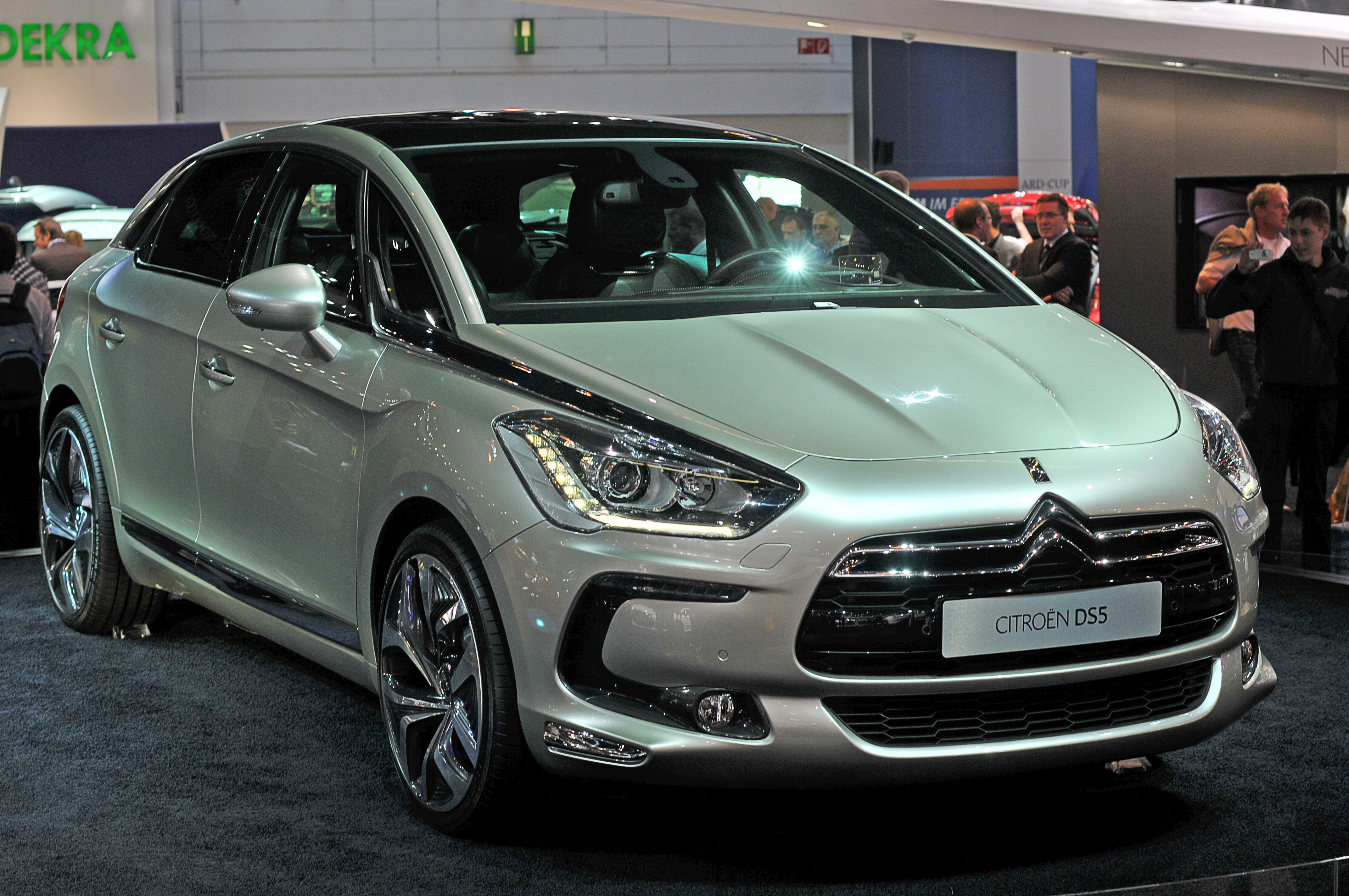 IAA 2011,Citroën DS5